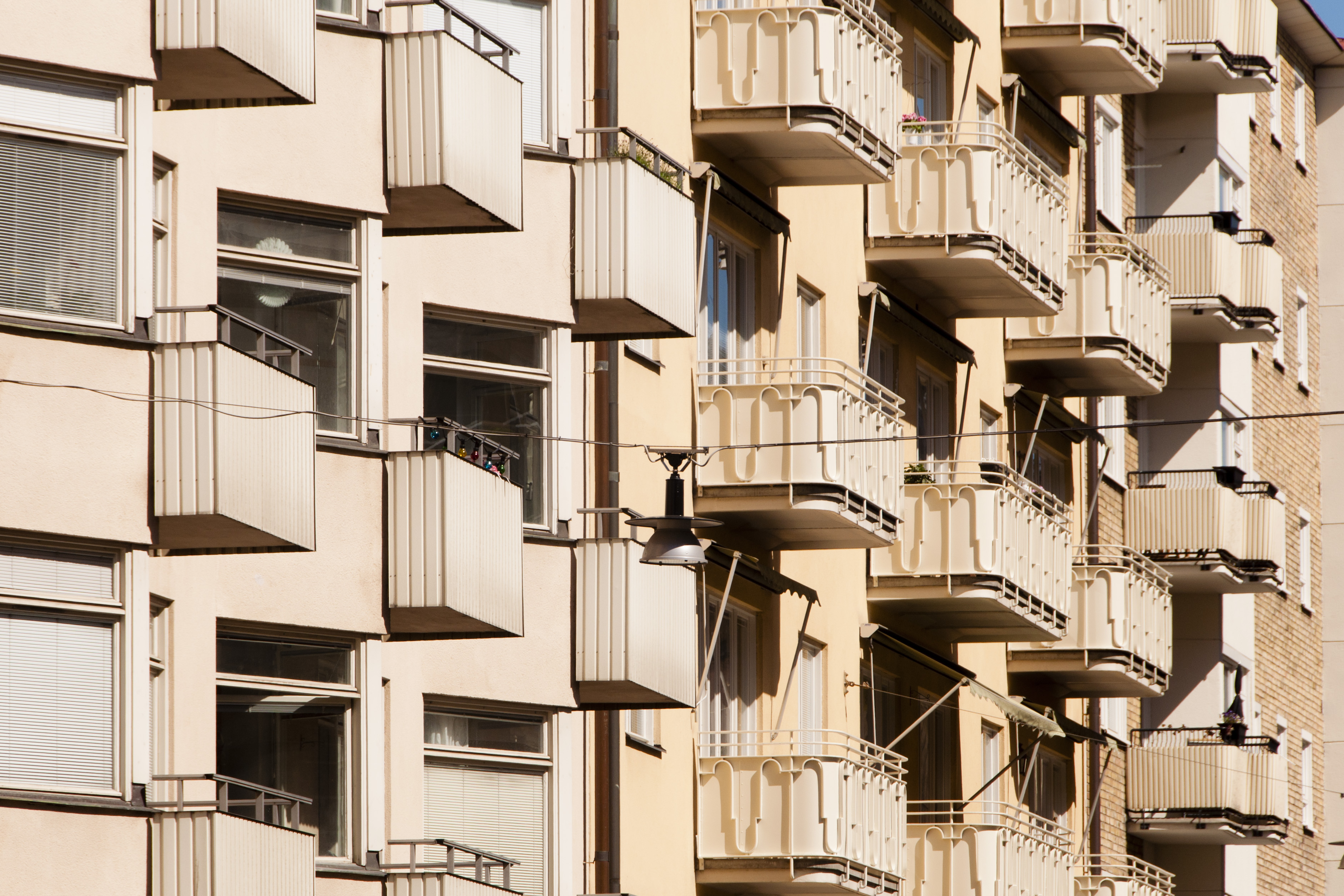 Balkonger på Linnégtran